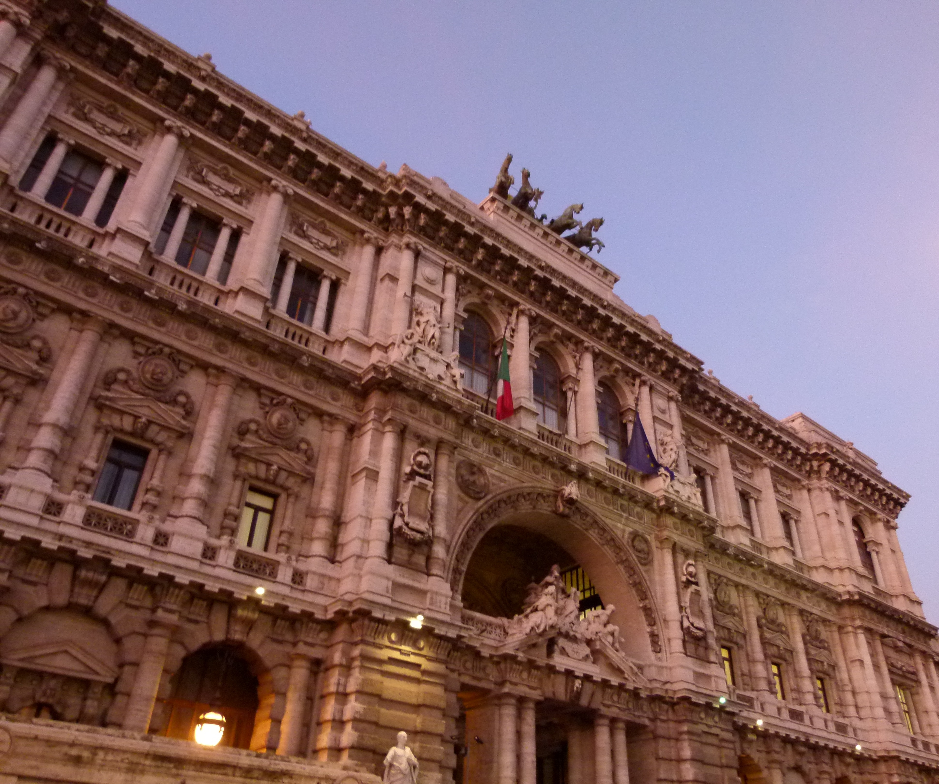 This photo was taken with Panasonic Lumix DMC-FZ100 camera, thanks to Panasonic. You can see all photographs in category: Taken with Panasonic Lumix DMC-FZ100.